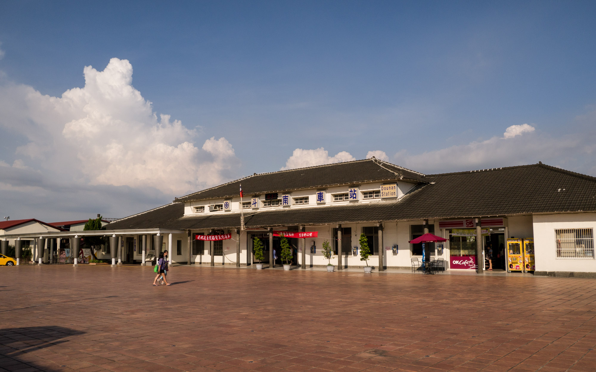 中文（台灣）: 斗南火車站的外觀